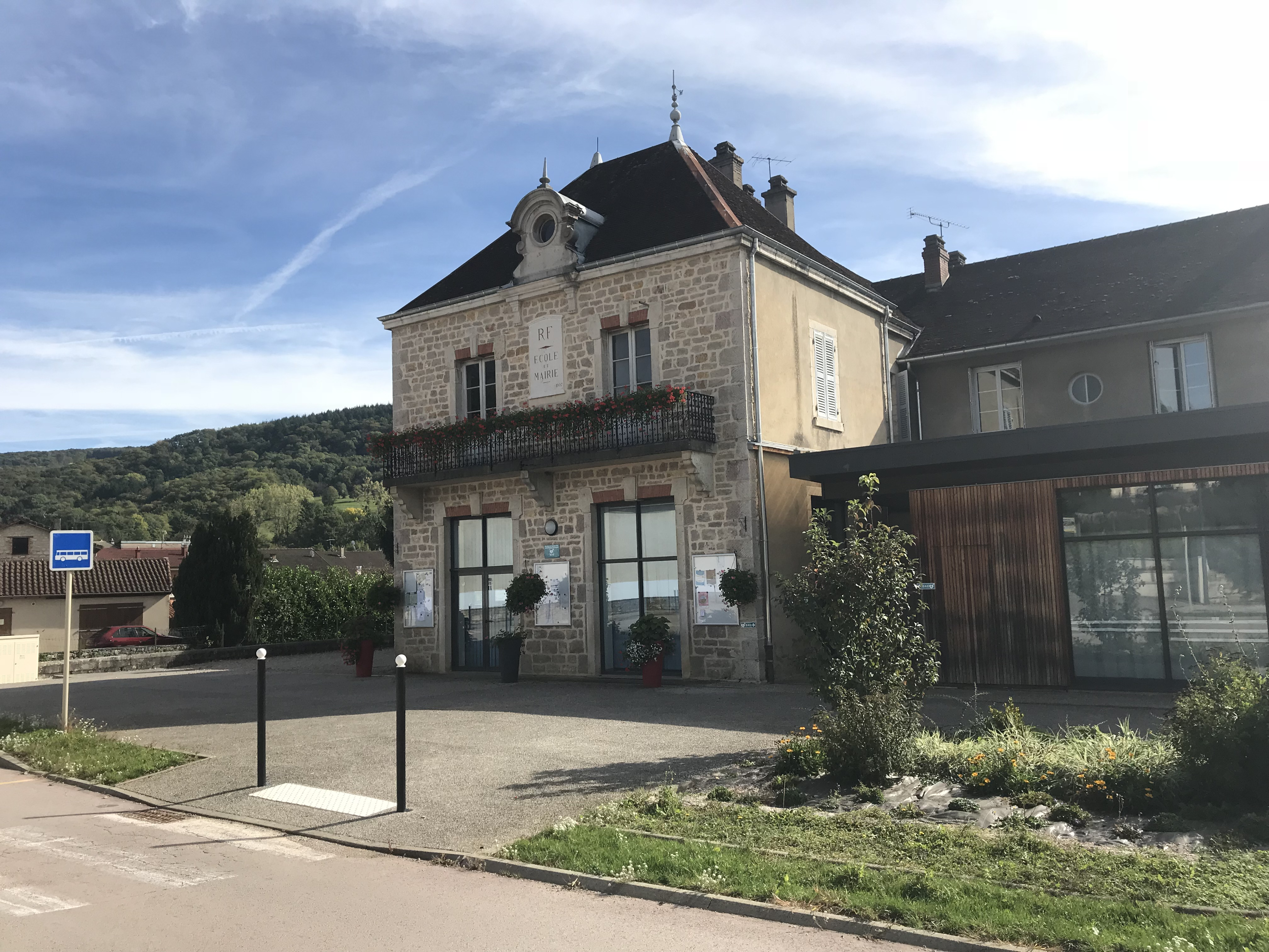 Image du village de Balanod, département du Jura, France, en octobre 2017.